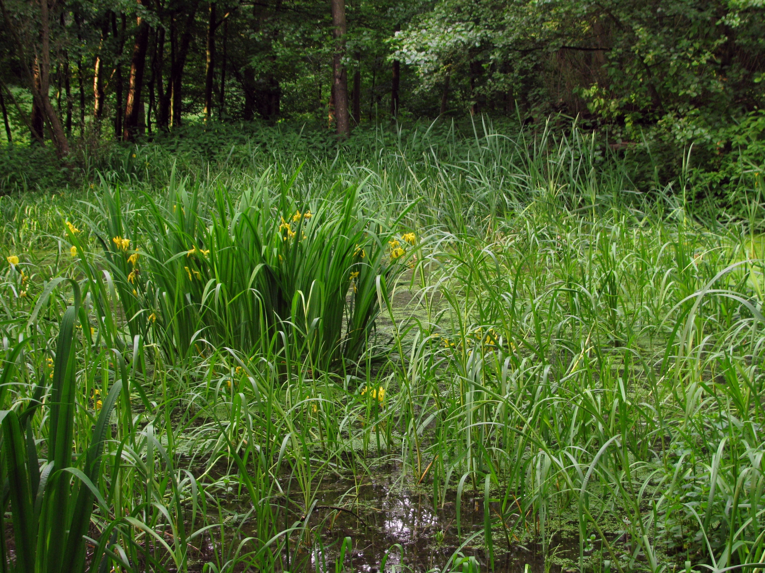 Biotop bei den Grummer Teichen